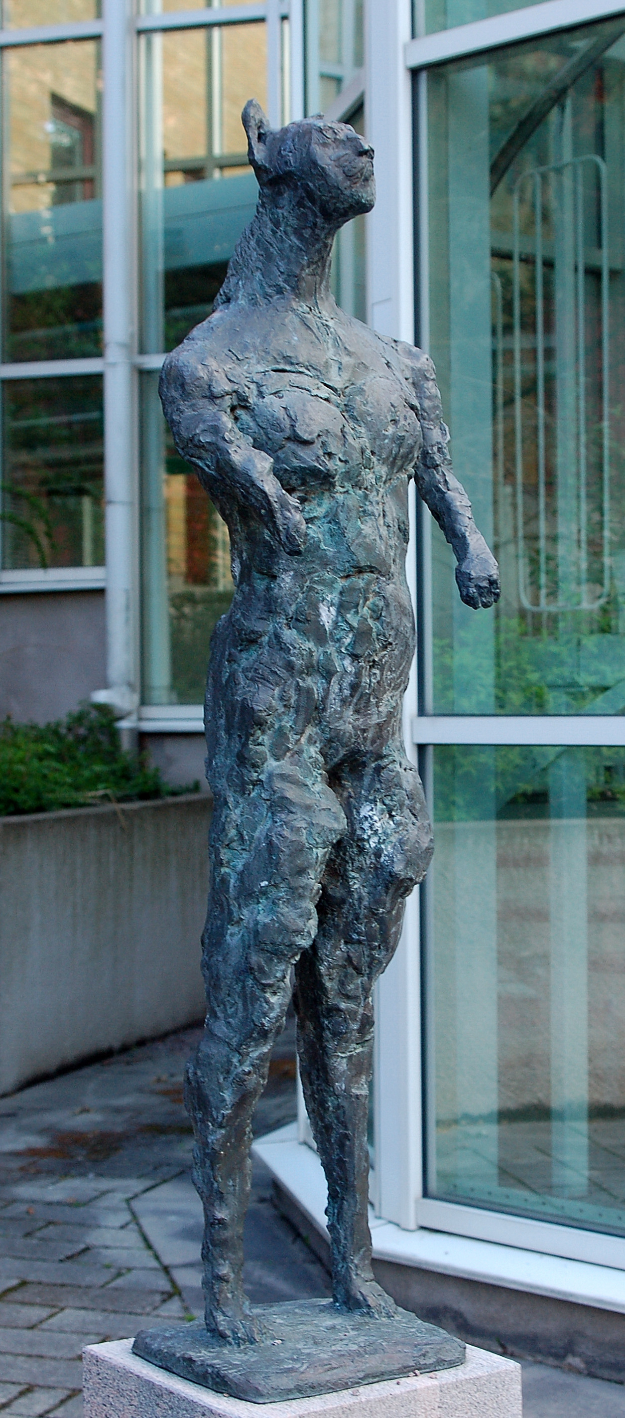 Kattkvinna av Inga-Louise Lindgren 1989 utförd i brons placerad vid Karlstads Universitetet, mellan hus 9 och hus 5.